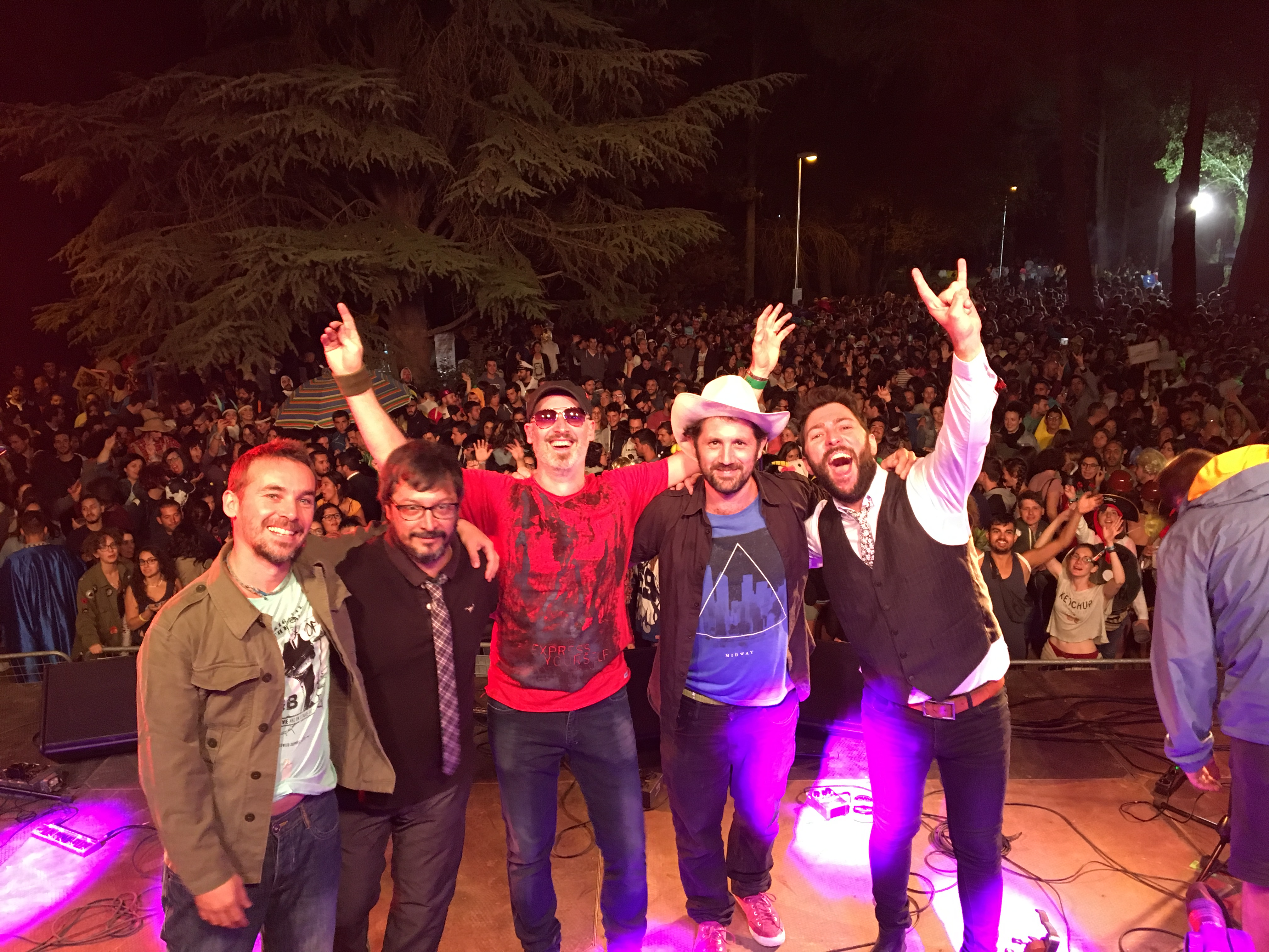 Foto de alguna de las muchas giras por Europa